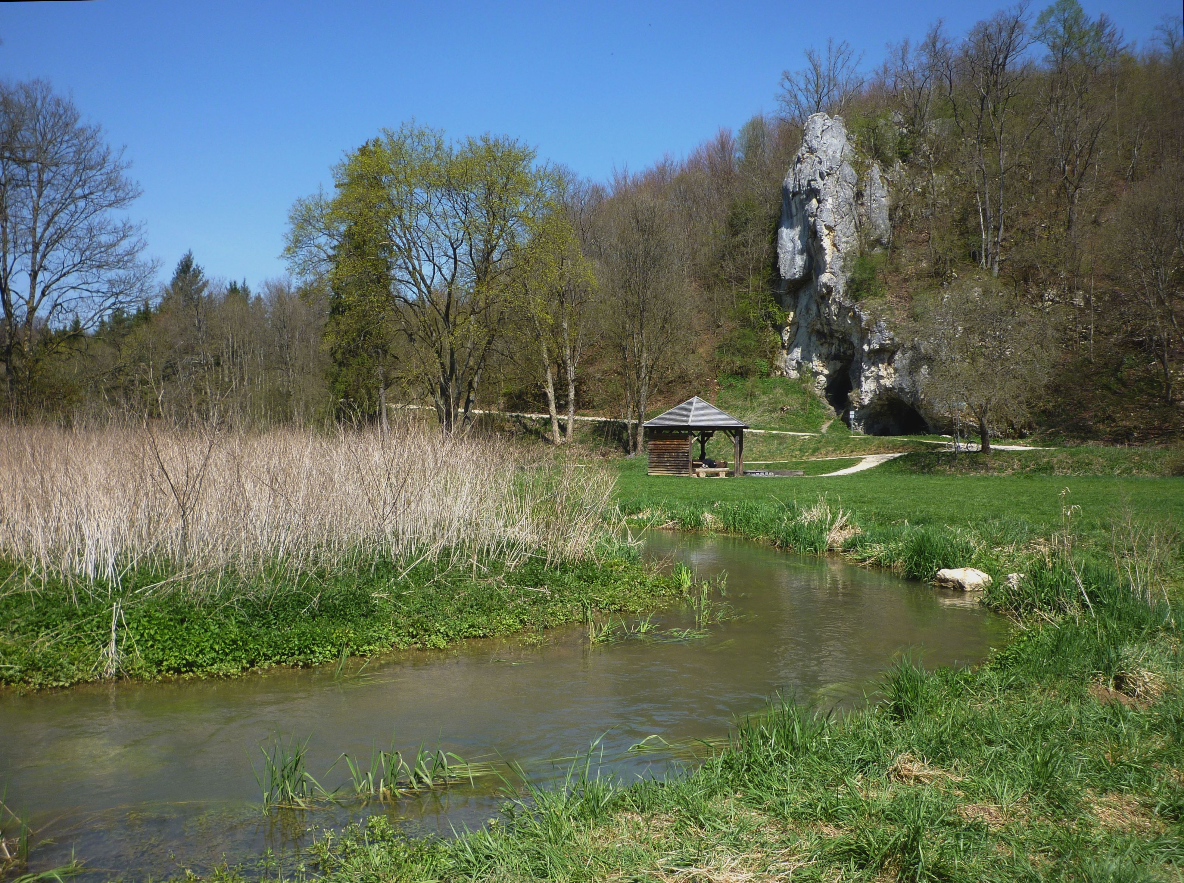 Fohlenhaus und Flußschleife der Lone